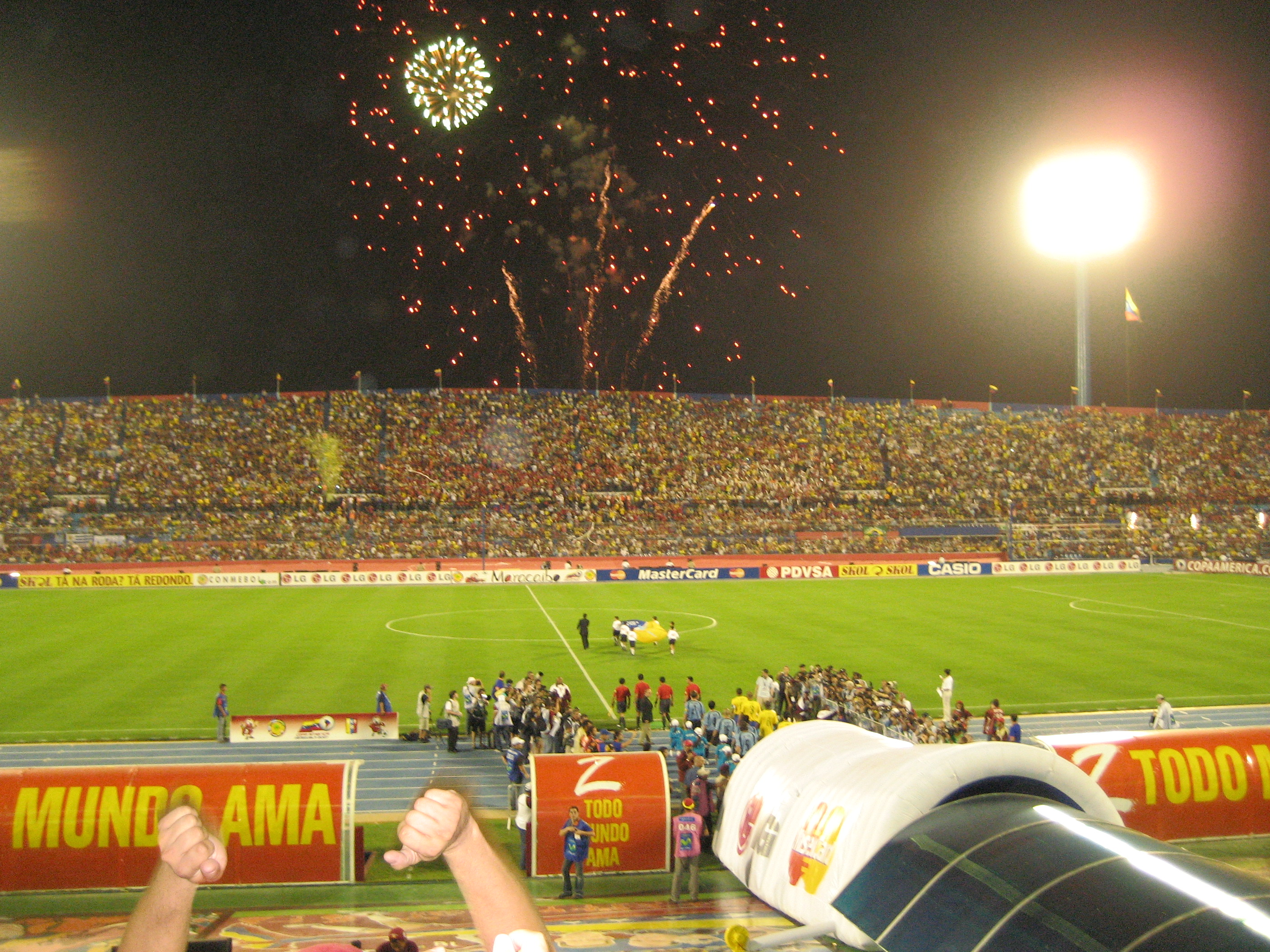 Brasil vs. Uruguay, Copa América 2007, Venezuela.